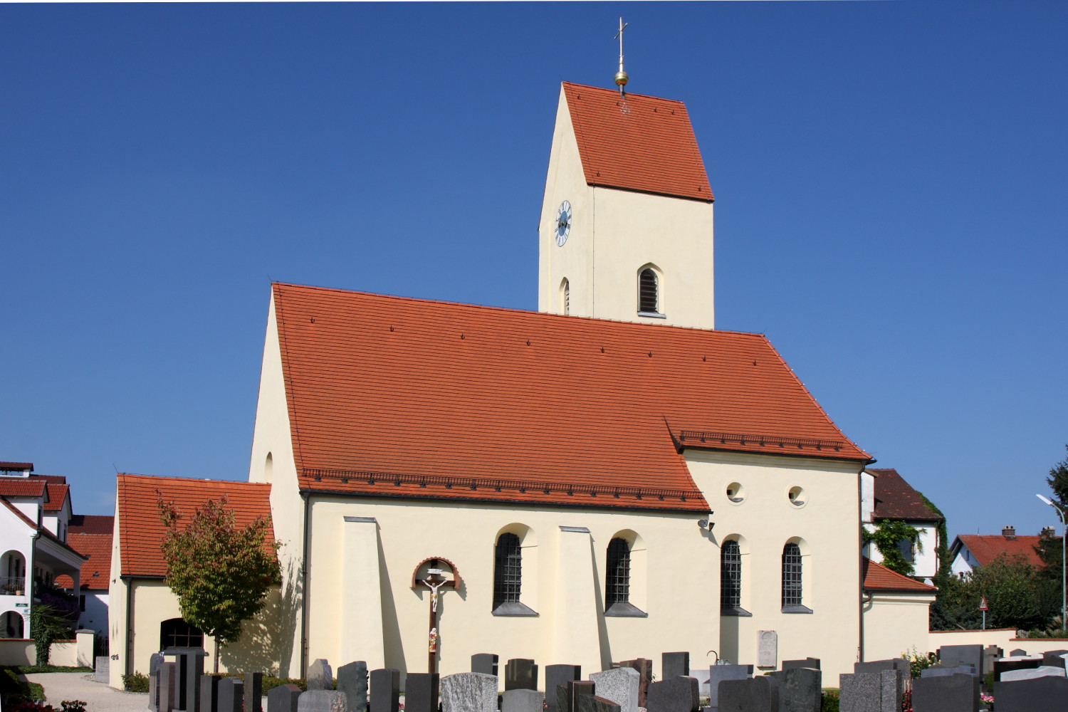 Kath. Pfarrkirche St. Nikolaus in Hög, romanisch, Umgestaltung 18. Jahrhundert;This is a photograph of an architectural monument.